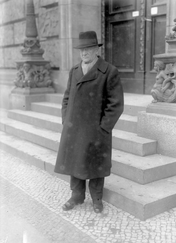 Der Vorsitzende der Ledebur-Partei teilte seinen Anschluss an die neugegründete Sozialistische Arbeiterpartei Deutschlands (S.A.P.D.) mit. Der bekannte Abgeordnete Ledebur.